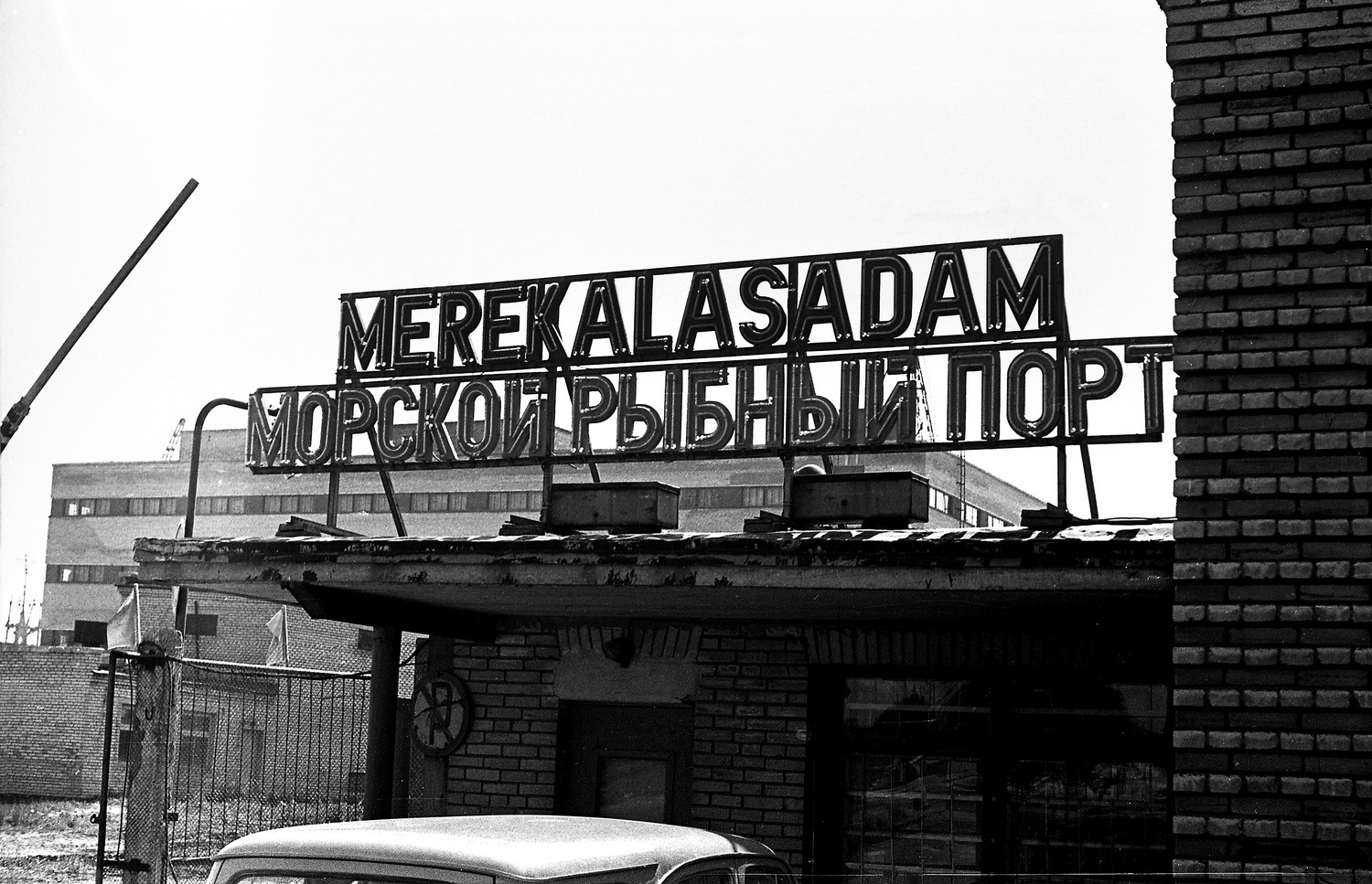 Värav sadamasse, Lõuna kaile. Paljassaare sadam 73